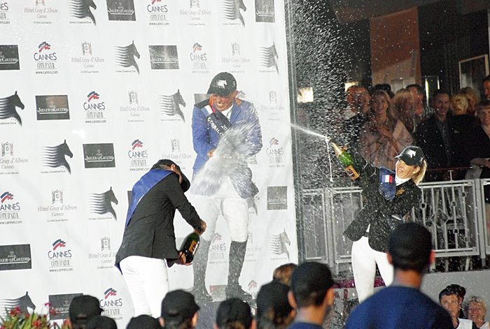 Podium du Global Champions Tour de Cannes. 1er - Gerco Schröder (au centre) / 2e - Rolf-Göran Bengtsson (à gauche) / 3e - Edwina Tops-Alexander (à droite)